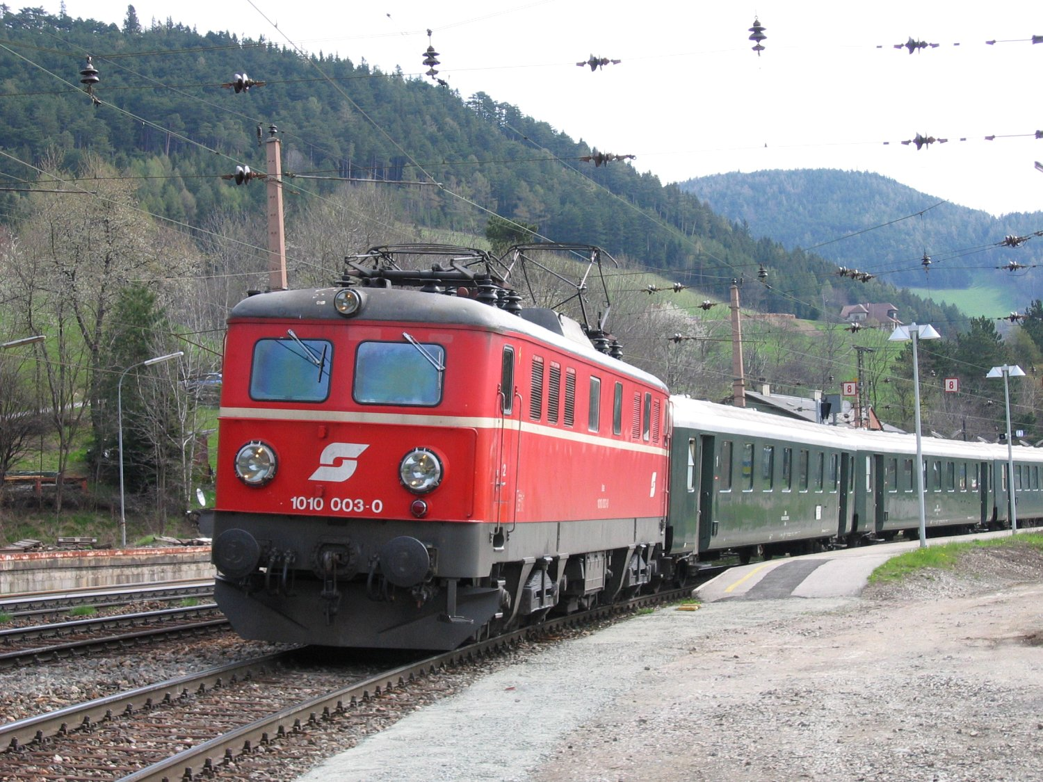 Description: ÖBB 1010 003-0 with tourist train "Erlebniszug Zauberberge" in Payerbach-Reichenau station on the Semmering line in Lower Austria own image, taken April 17, 2004 Photographer: Herbert Ortner, Vienna, Austria